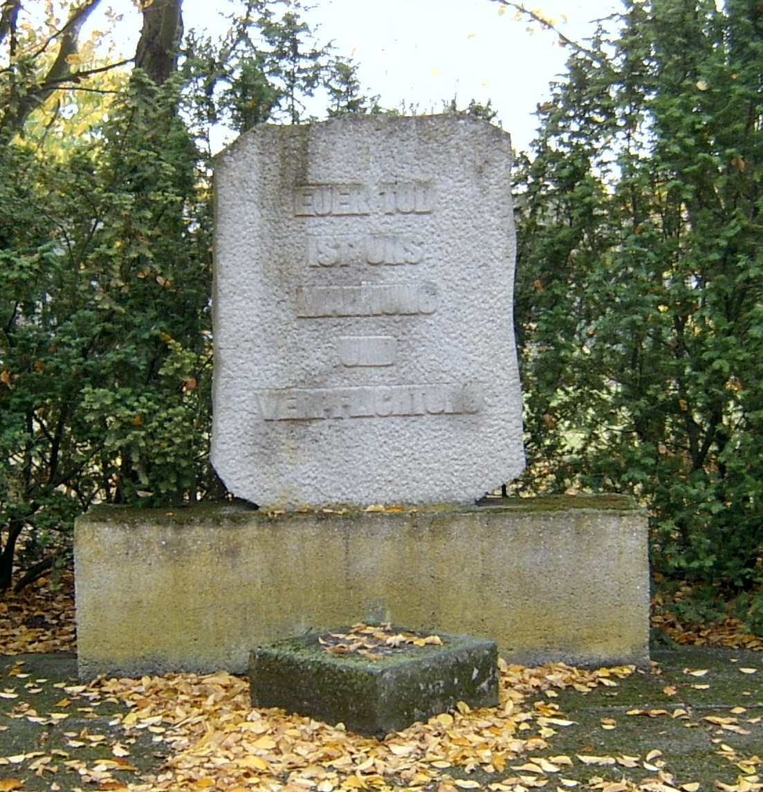 Grab für die Gefallenen im Friedhof Güldendorf/Frankfurt (Oder). Inschrift: Euer Tod ist uns Mahnung und Verpflichtung.